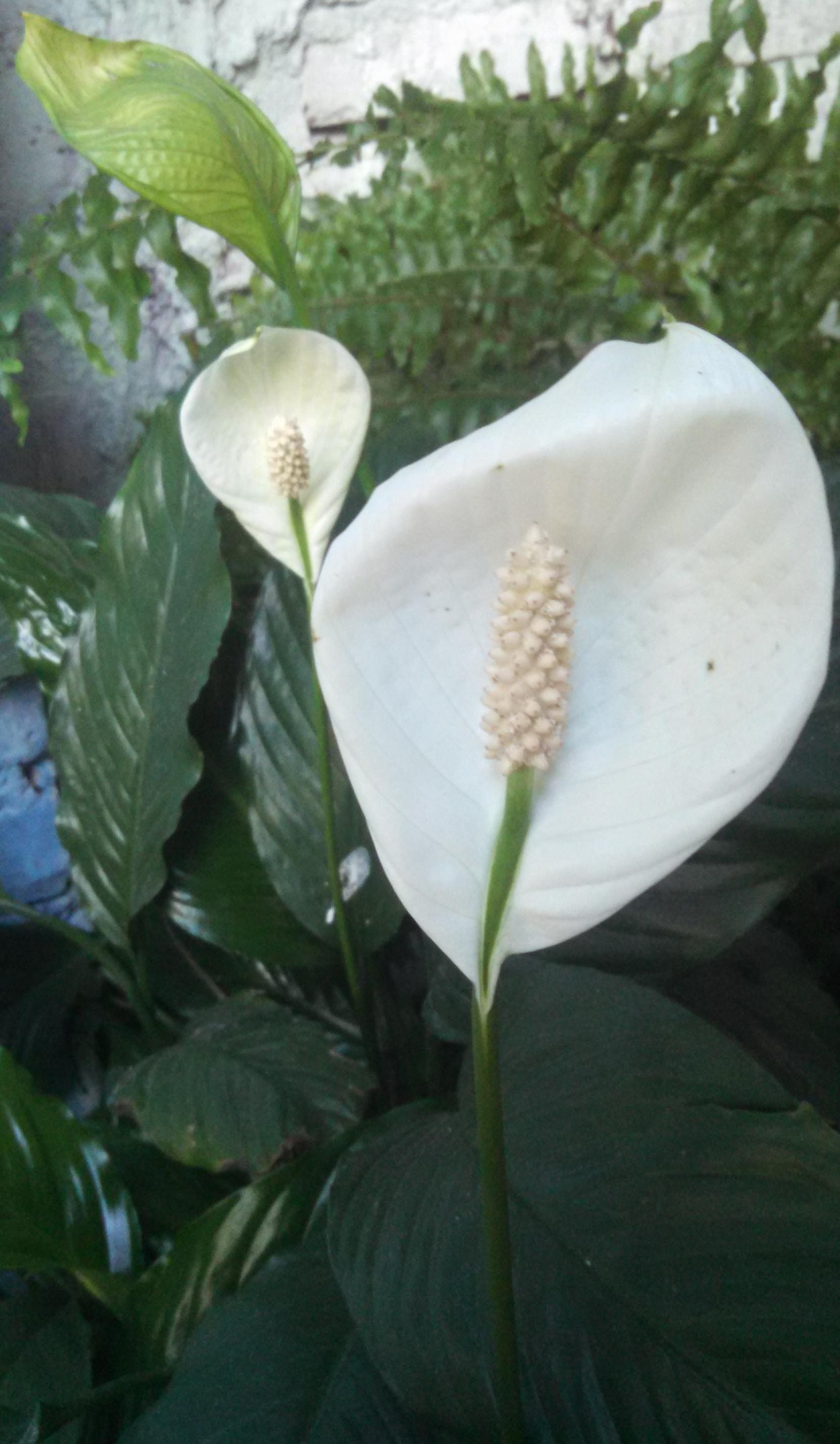 Foto en primer y segundo plano de dos flores de Spathiphyllum.